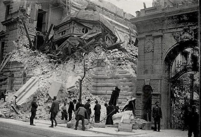 Фотографије бомбардованог Београда 06. 04. 1941. и улазак окупатора у Београд априла 1941.